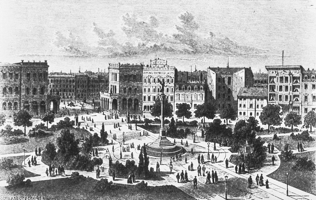 Berlin, Mehringplatz. View to Southwest.